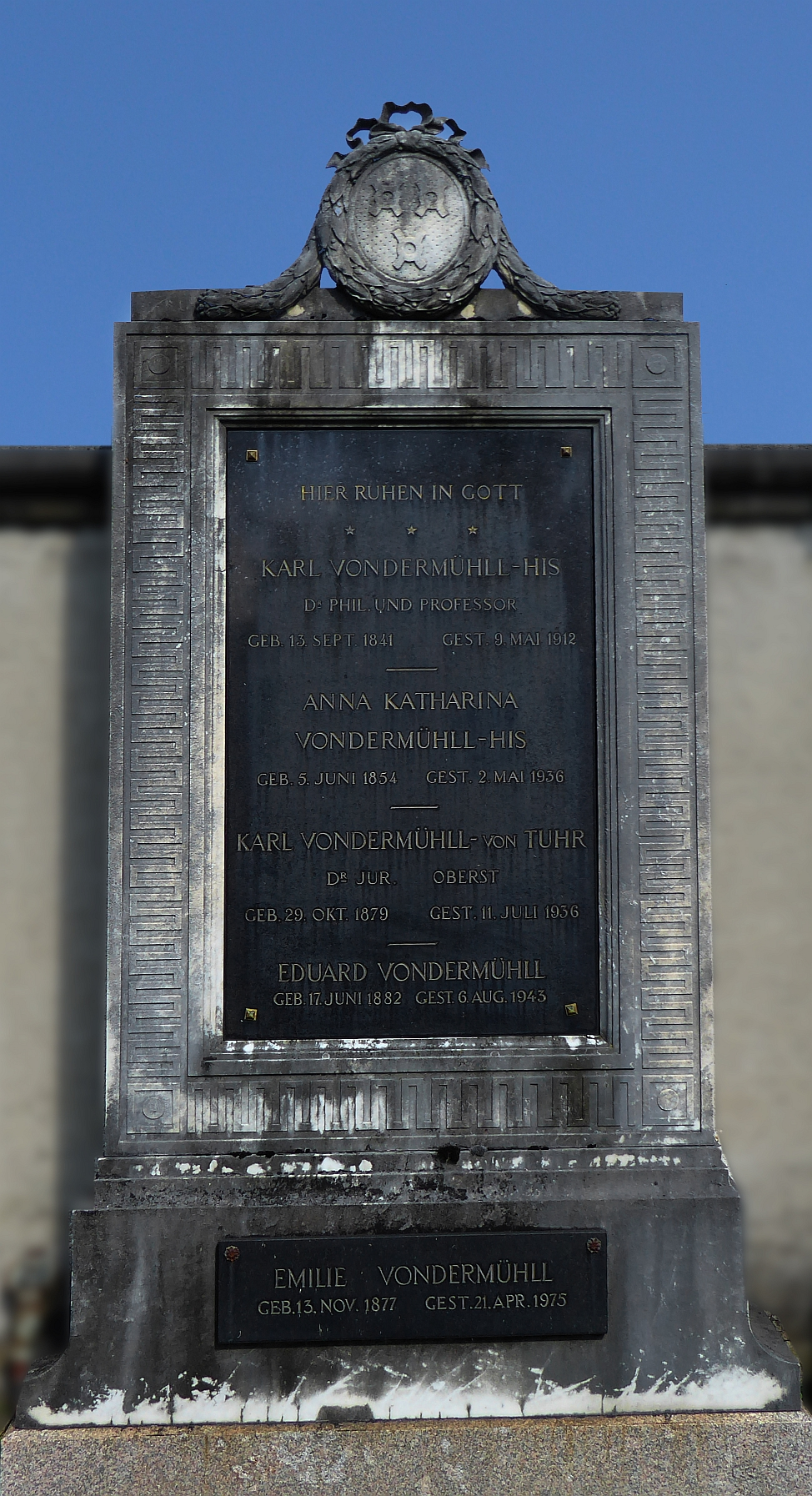 Karl von der Mühll-His (1841–1912) Dr. Phil., Professor, Grab auf dem Friedhof Wolfgottesacker, Basel